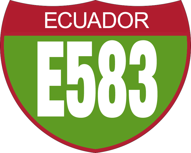 Disco de Identificación Ruta E583